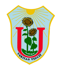 Znak NSČU